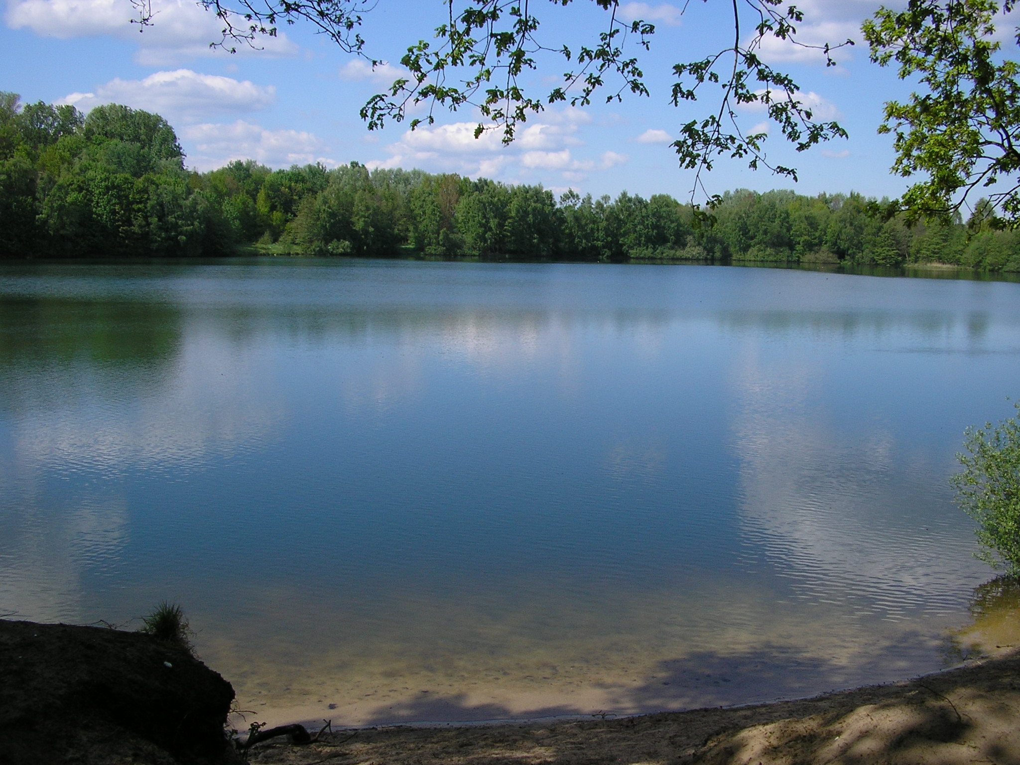 Der Tillysee bei Oldenburg